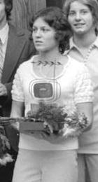 Title: Berlin, Sportler des Jahres geehrt People in the image: Köste, Klaus: Leichtathlet, Turner, DDR Factual corrections and alternative descriptions are encouraged separately from the original description. Additionally errors can be reported at this page to inform the Bundesarchiv. Original historic description: ADN-ZB-Katscherowski-20.12.72-Sue-Berlin :Sportler des Jahres geehrt-Im Kinosaal des Fernsehturms am Alexanderplatz wurden am 20.12.72 die durch die Sportlerumfrage der "Jungen Welt" für 1972 ermittelten "DDR- Sportler des Jahres" geehrt. V.l.n.r.: Helga Seidler, Wolfgang Nordwig, Rita Kühne, Renate Stecher, Klaus Köste, Roland Matthas, Monika Zehrt, Kornelia Ender und Dagmar Luenenschloß-Käsling. (Weiteres siehe ADN-Meldg.)